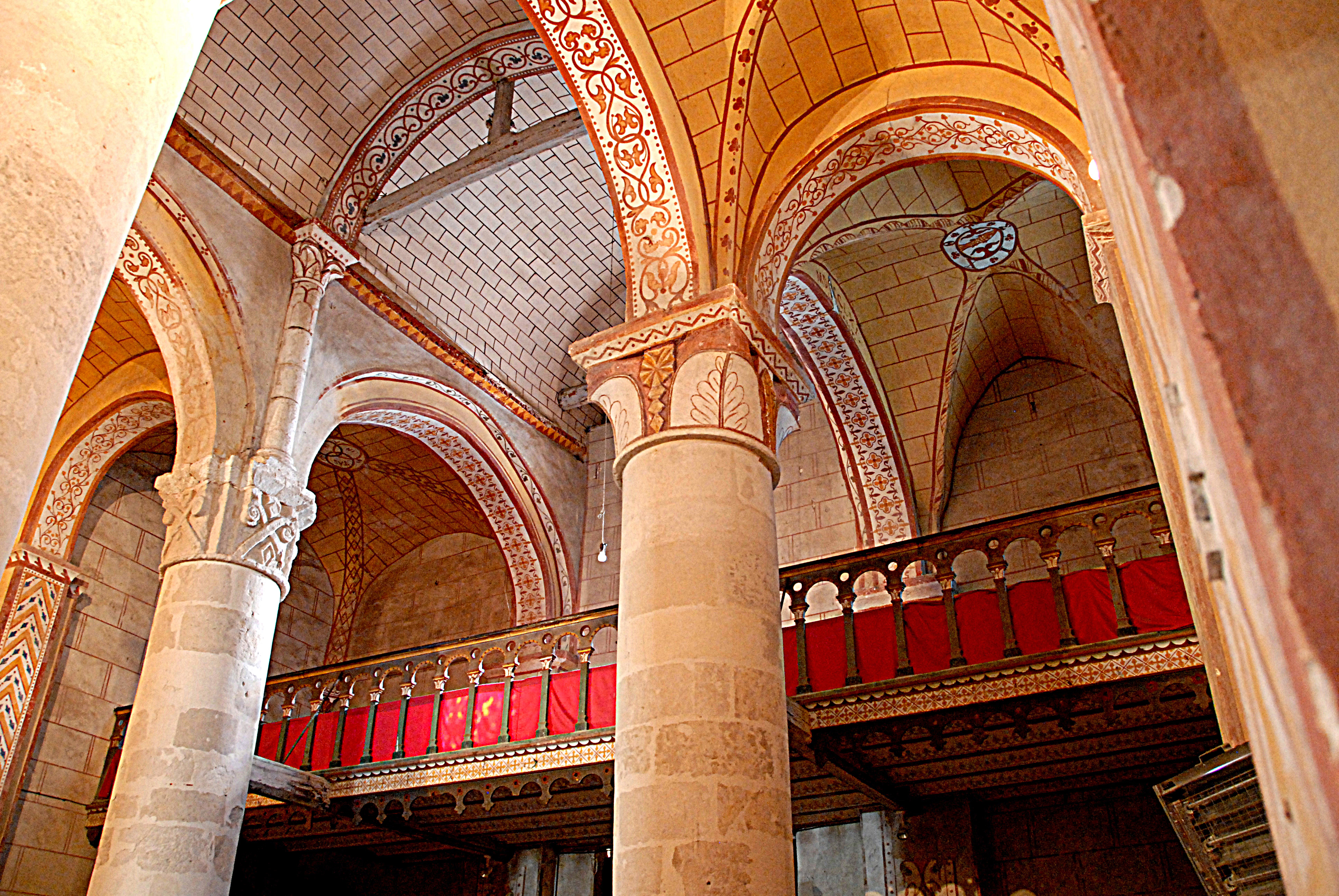 Civaux, Kirche, Langhaus, Tribüne im 1. Joch